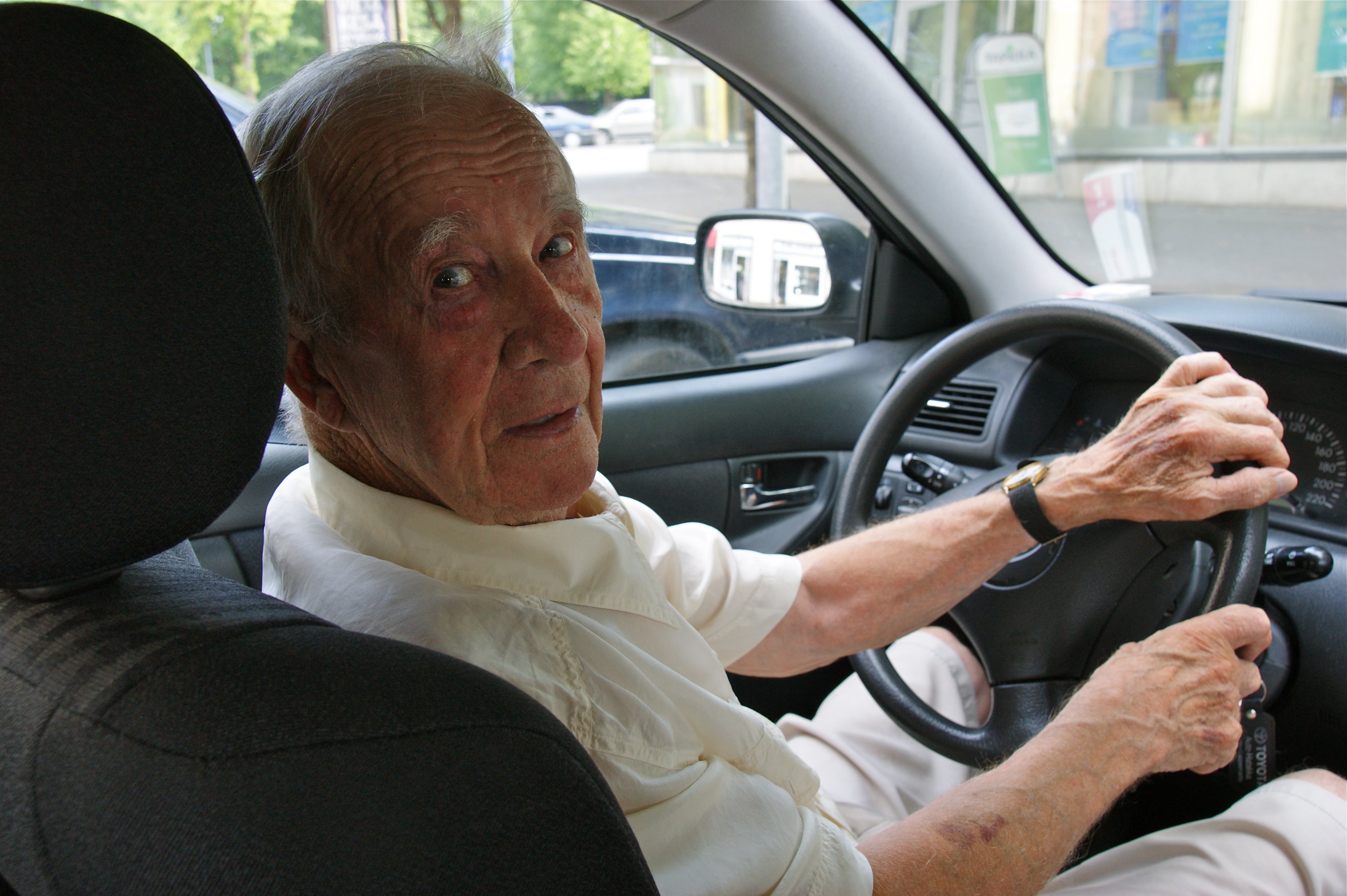 Эйно Киуру, Лаппеенранта, 2010 год